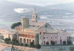 Valentano (Italia) - Valentano, vista dal Monte Starnina Autore: Giovanni Ciucci. Copyright (C) 1998 ComputerVille, ceduta in pubblico dominio per questo formato. --M/ 20:14, Lug 7, 2004 (UTC)